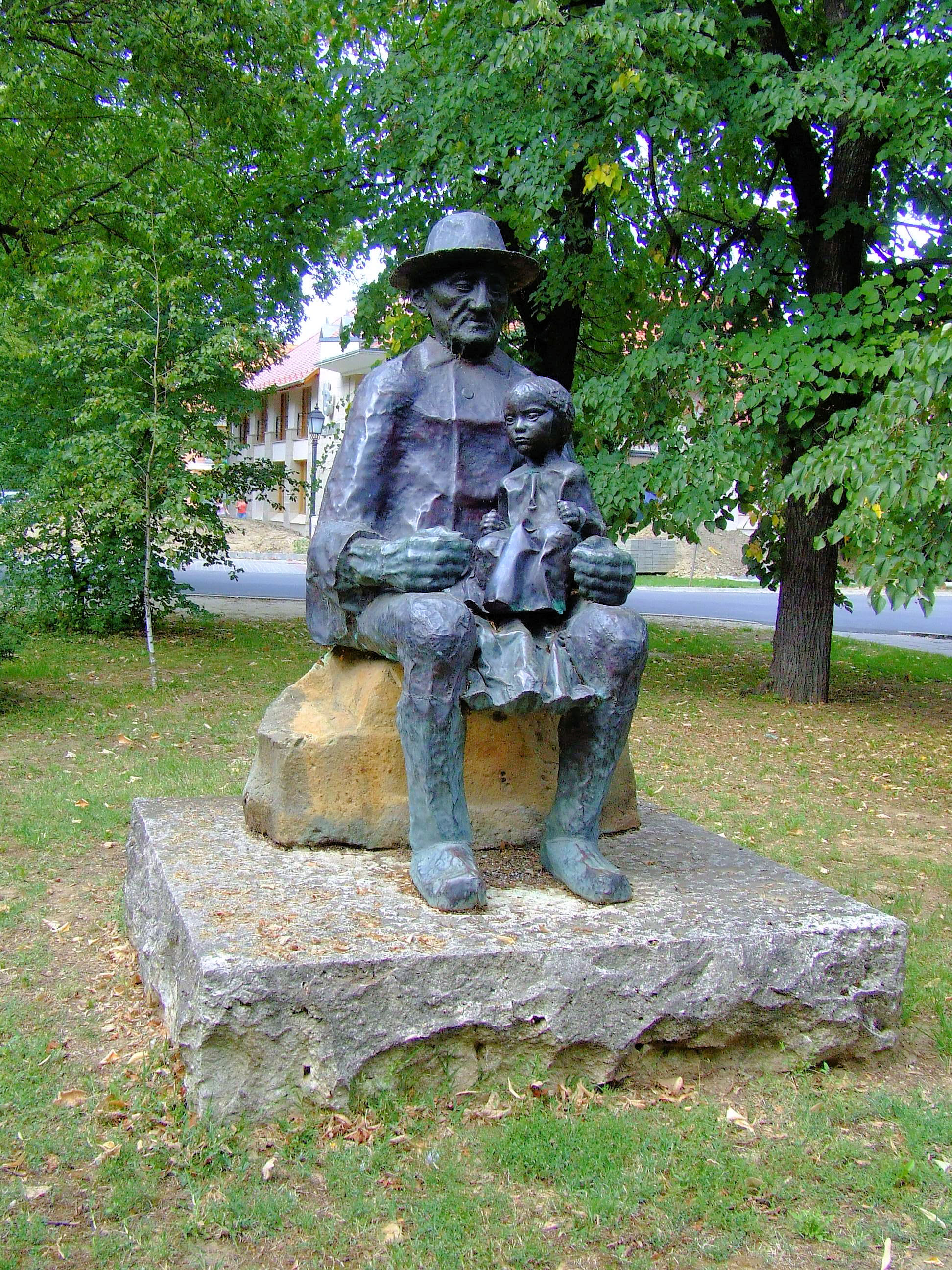 Meszlényi János (*1939) Generációk című szobra Bólyon